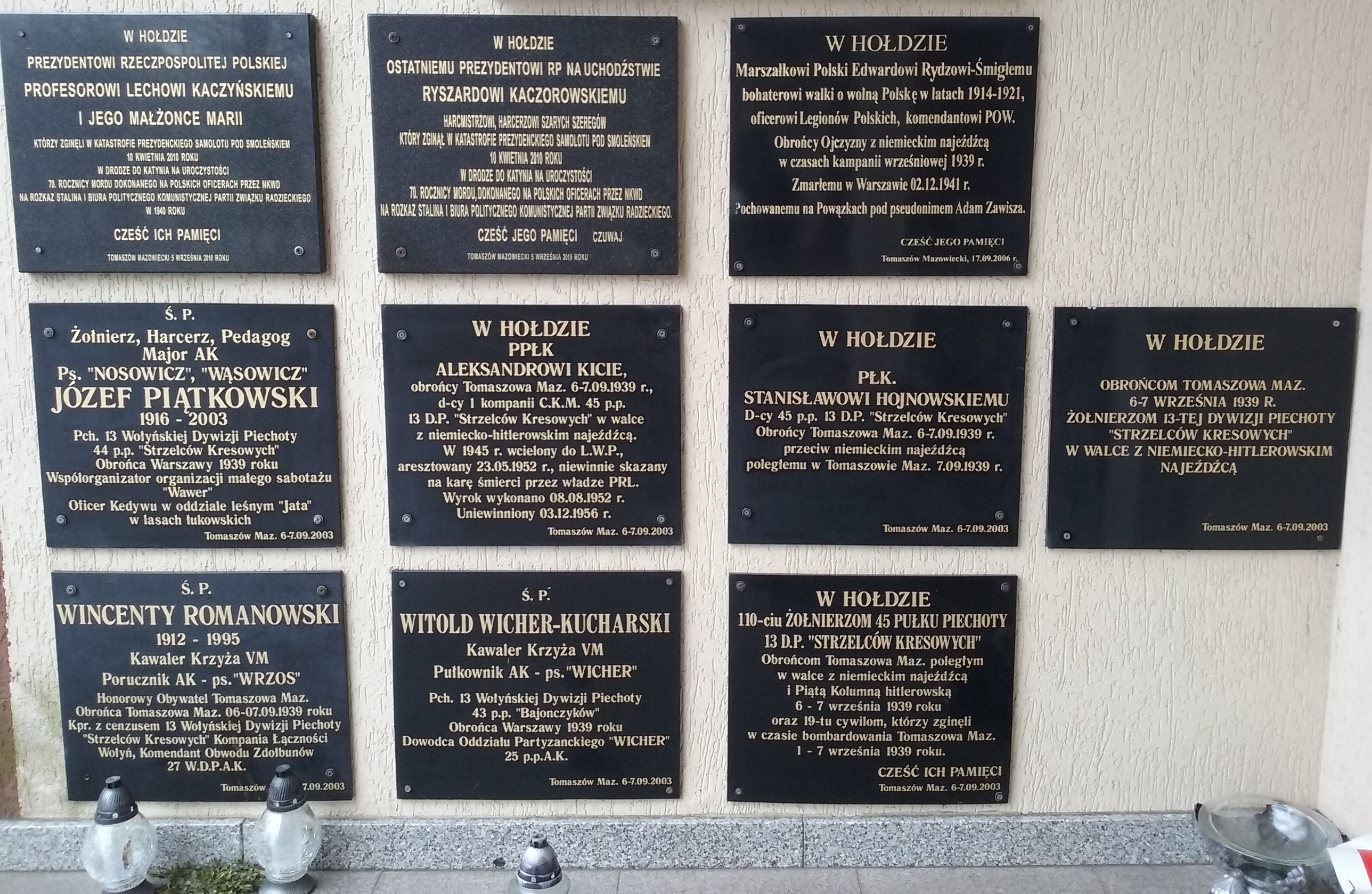 Tablice pamiątkowe, kruchta kościoła pw. św. Jadwigi na Niebrowie w Tomaszowie Mazowieckim